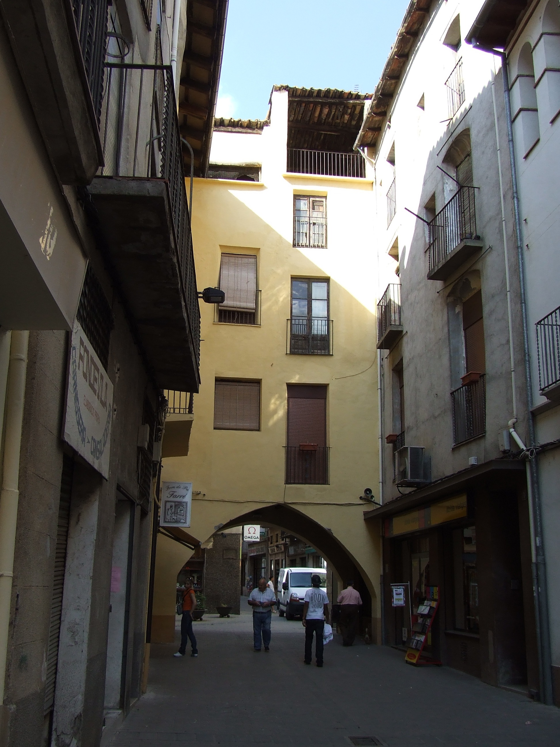 Carrer del Mercadal, extrem nord (Tremp, Pallars Jussà)